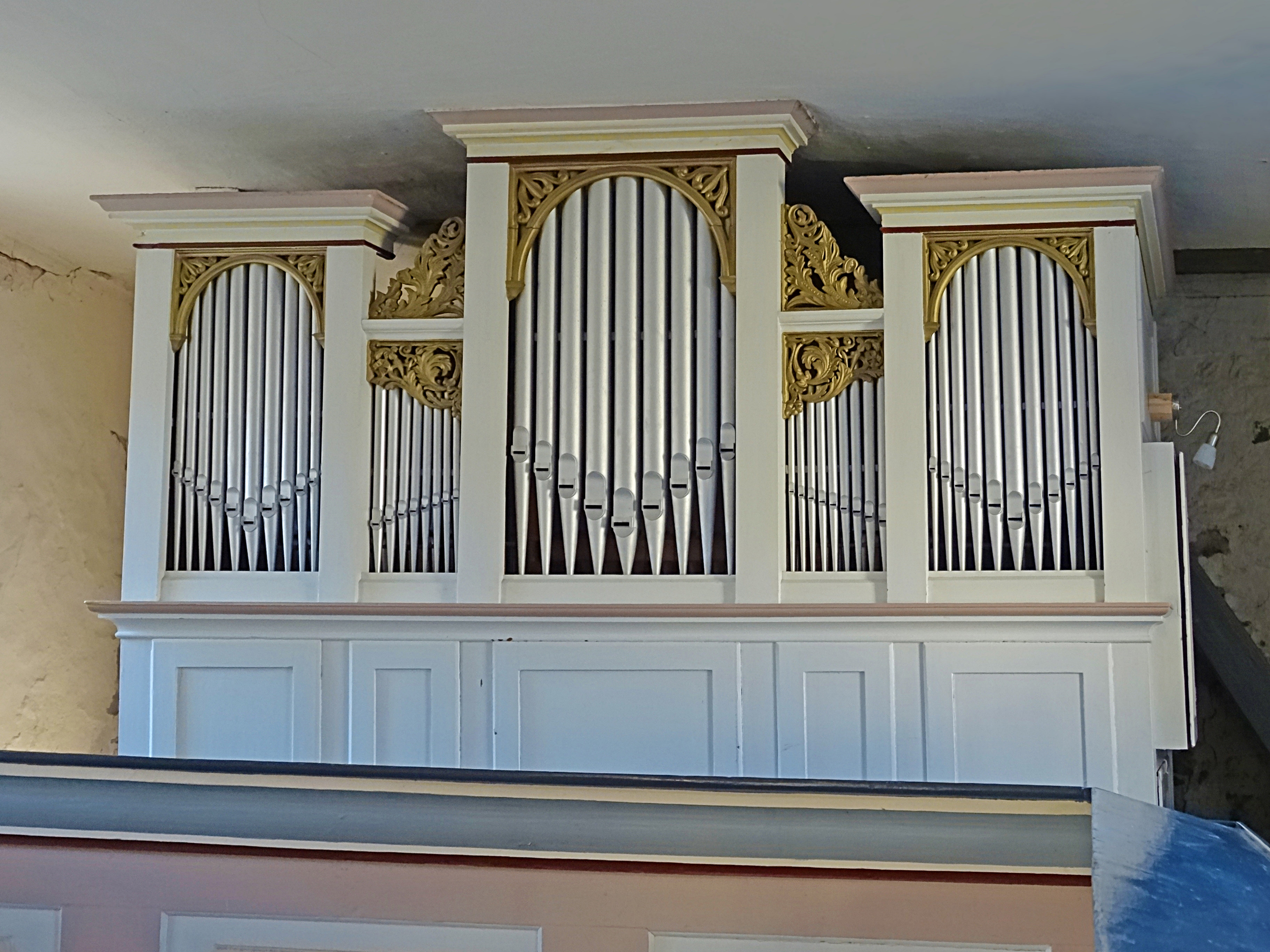 Die Orgel von Jacob Vogt aus Corbach wurde 1874 für die katholische Gemeinde in Wilnsdorf bei Siegen/ Westfalen gebaut. R. Knauf nahm die Orgel für einen Neubau in Zahlung und baute sie 1892 in die Nicolaikirche (Krimderode) ein.[1]